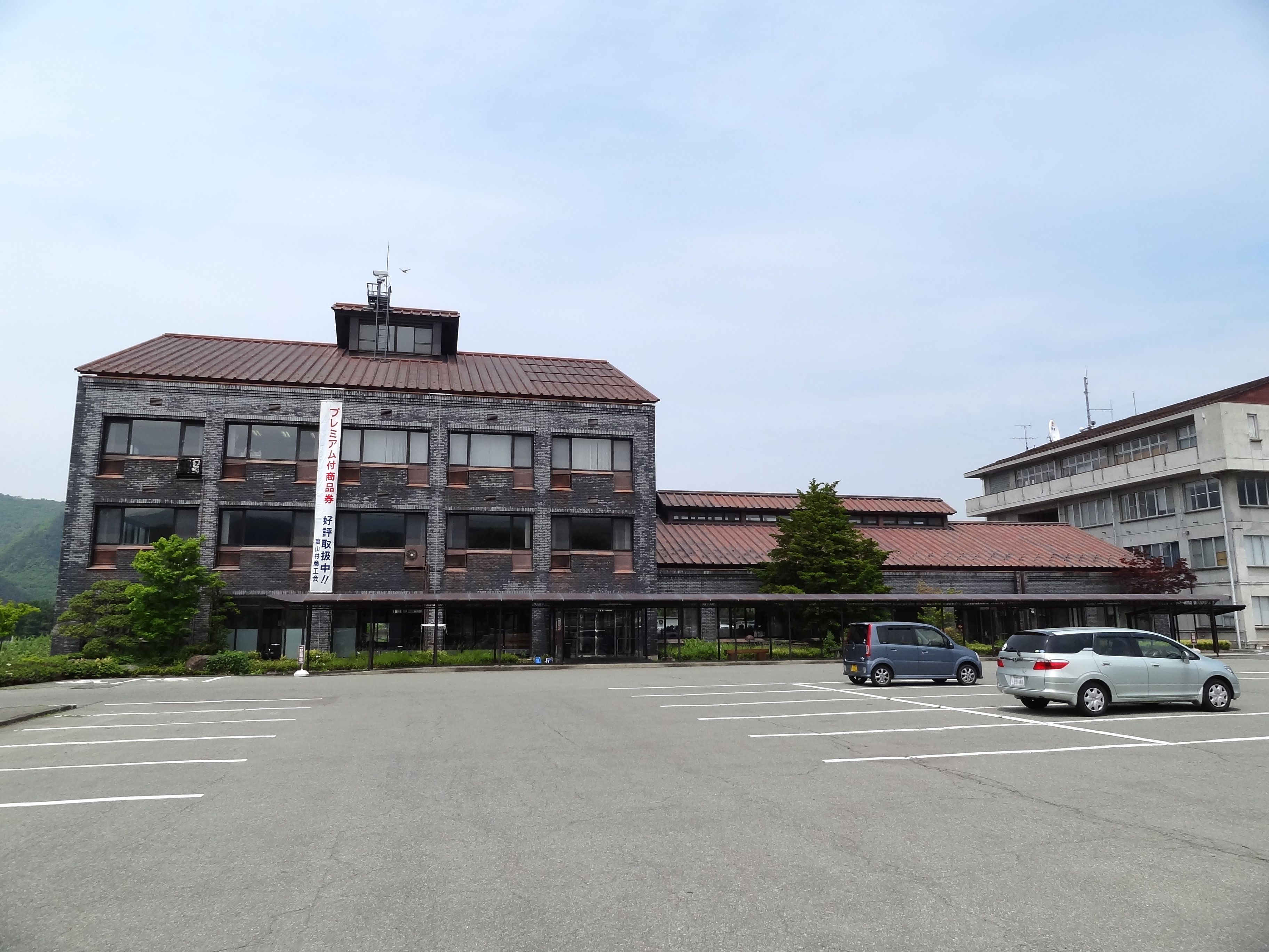 長野県 高山村役場